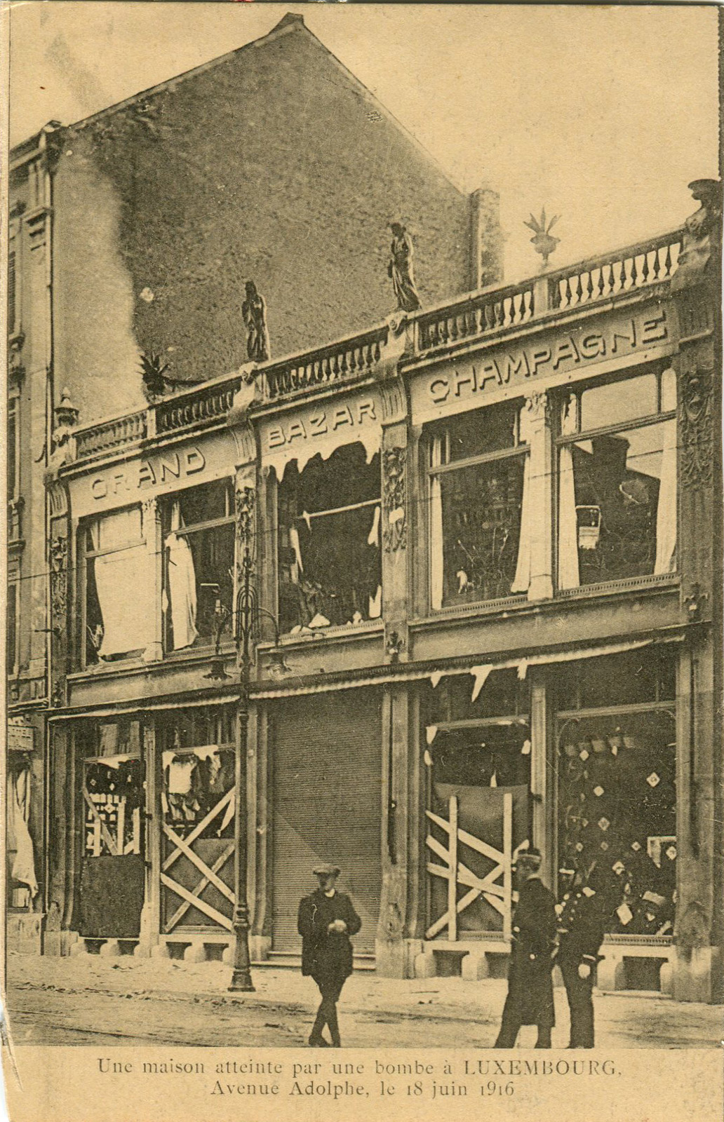 An der Avenue Adolphe, haut d'Avenue de la Liberté, also d'"Nei Avenue", nom Bombardement vum 18. Juni 1916.